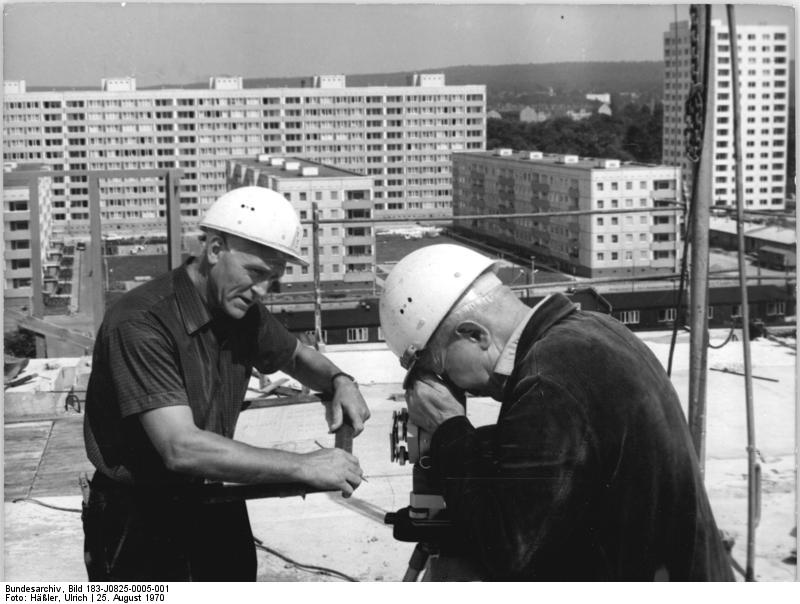 Dresden, Bauarbeiter mit Nadirgerät Zentralbild Häßler 25.8.70.kn-Dresden: Wohnungsbauten in Dresden Johannstadt - Süd wachsen- Helmut Kircheis (links) und Franz Kaiser vom VEB Ingenieurvermessung Dresden bei Vermessungsarbeiten am Nadirletgerät. Der Perspektivplan der Stadt Dresden sieht u.a. für das Bebauungsgebiet Johannstadt-Süd 2 588 Wohnungseinheiten vor. In den vergangenen Monaten konnten bereits wieder 280 Wohnungseinheiten an neue Mieter übergeben werden. Nadir: arabisch, Fußpunkt des Himmels